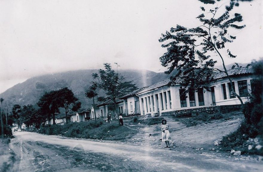 Avenida Colón de Calarcá, Quindío en la década de 1950